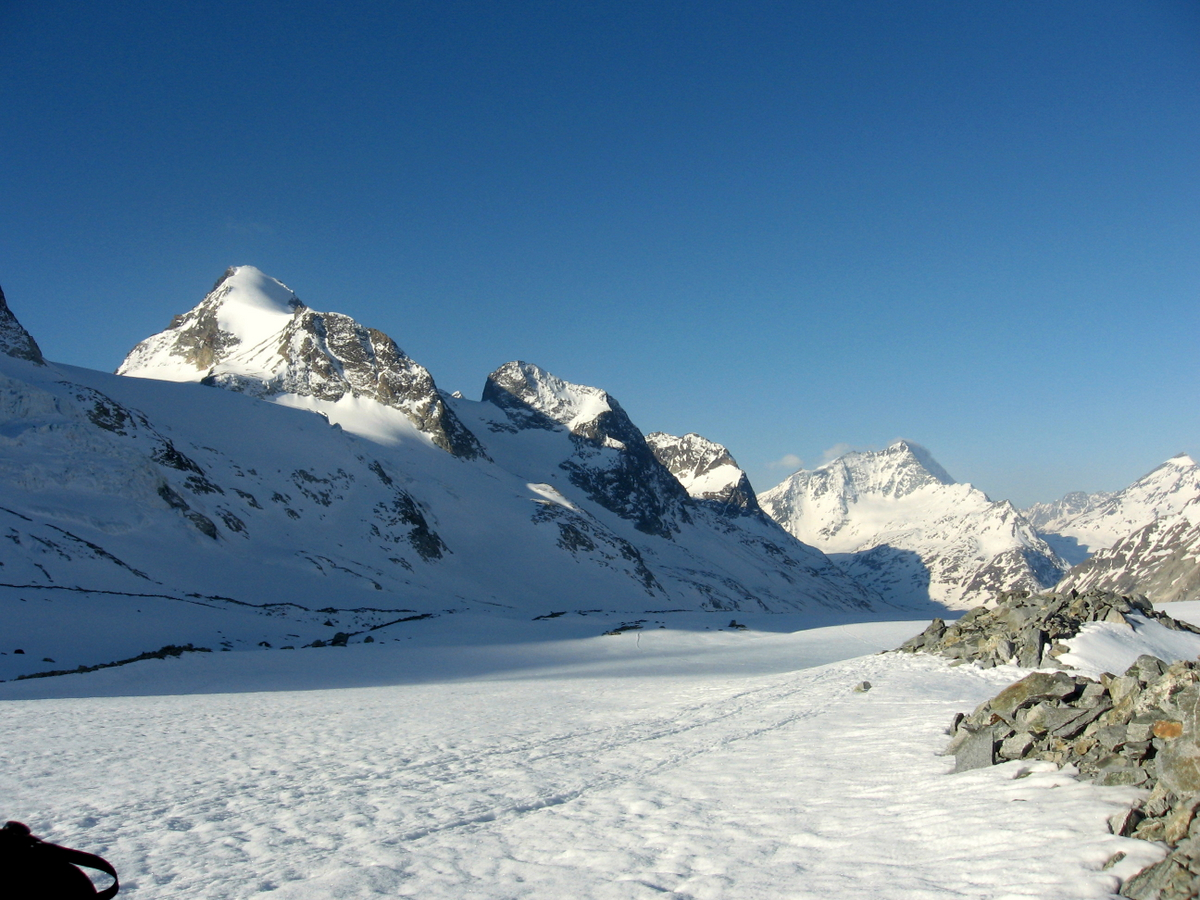 Glacier d'Otemma and Mont Gelé (Valais, Switzerland)